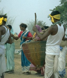 Tanz indischer Ureinwohner, Jharkhand, Indien im März 2001